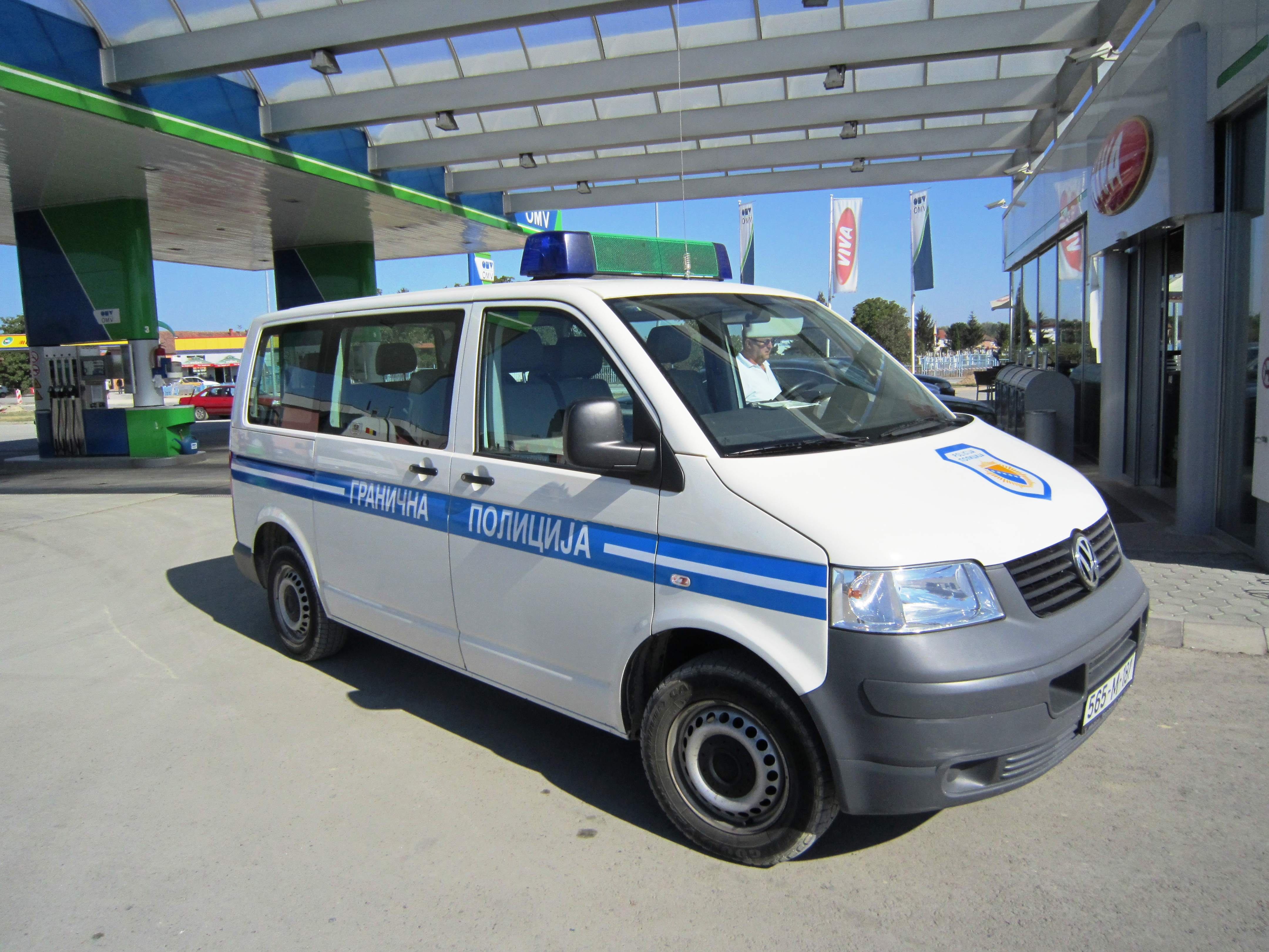 Politieauto uit Bosnië en Herzegovina